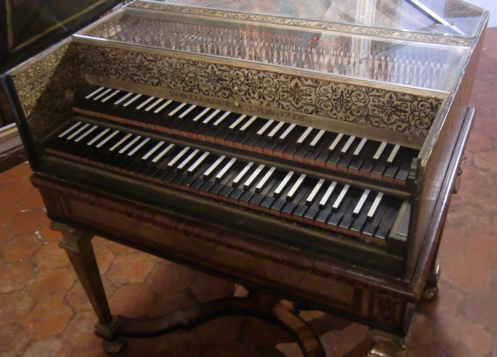 Les deux claviers du clavecin de Pierre Donzelague (1716)